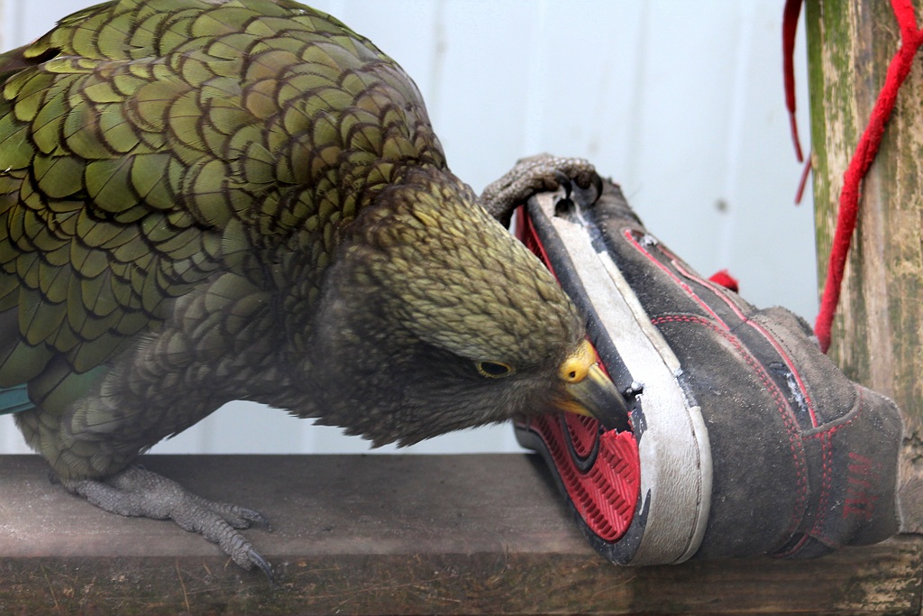 Kea in Zoo Veldhoven, Nederland